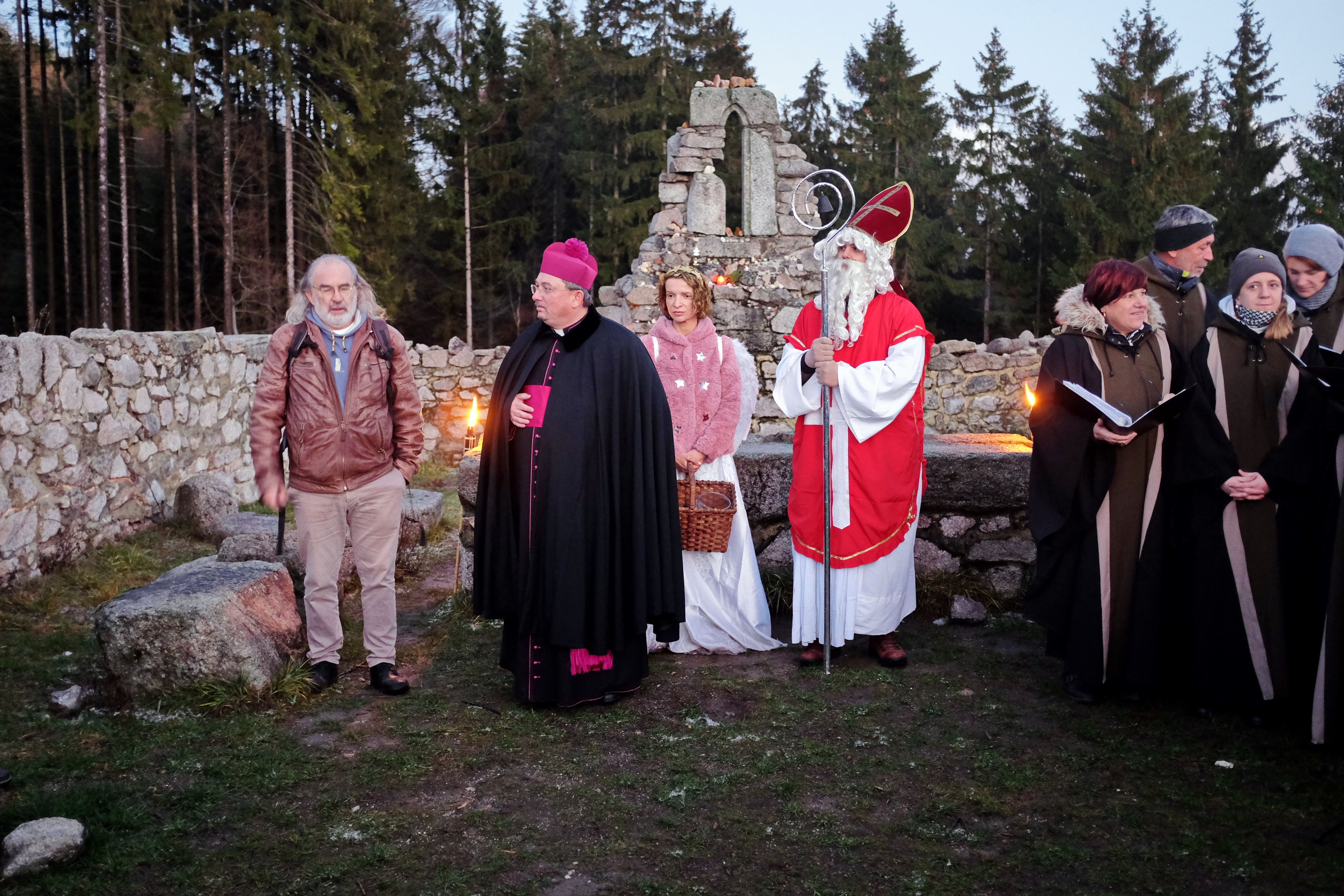 Mikulášská tradice na kostele svatého Mikuláše u Hruškové v prosinci 2018, okres Sokolov